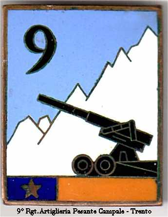 Distintivo del 9° Reggimento di Artiglieria Pesante Campale a Trento